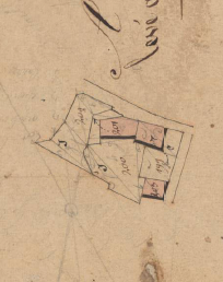 Cal Coix d'Angostrina en el Cadastre Napoleònic del 1812 (Arxius Departamentals dels Pirineus Orientals)